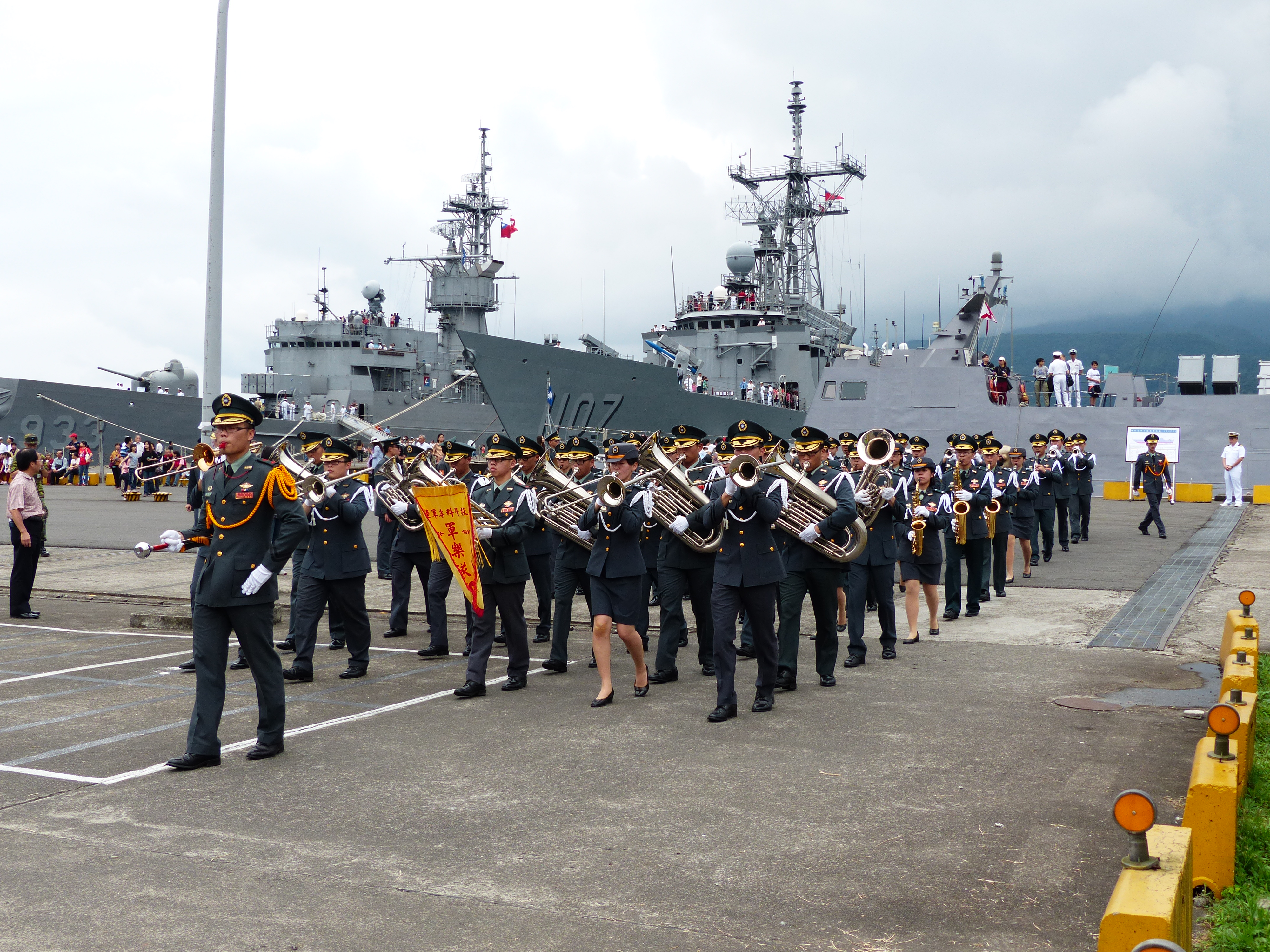 中文（台灣）: 離開碼頭的陸專軍樂隊本隊。